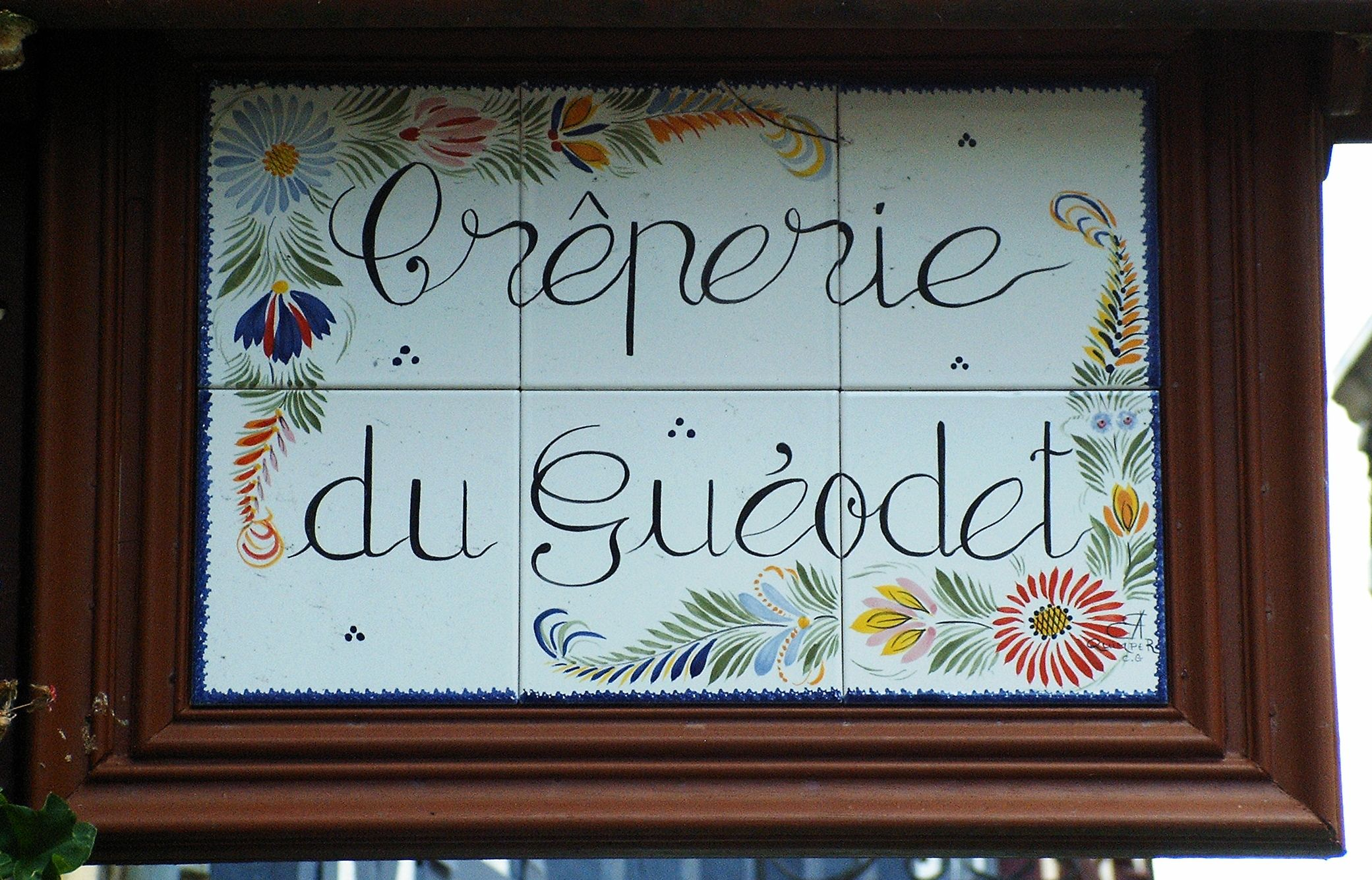 Quimper : Fayence - hier ein Creperie-Schild